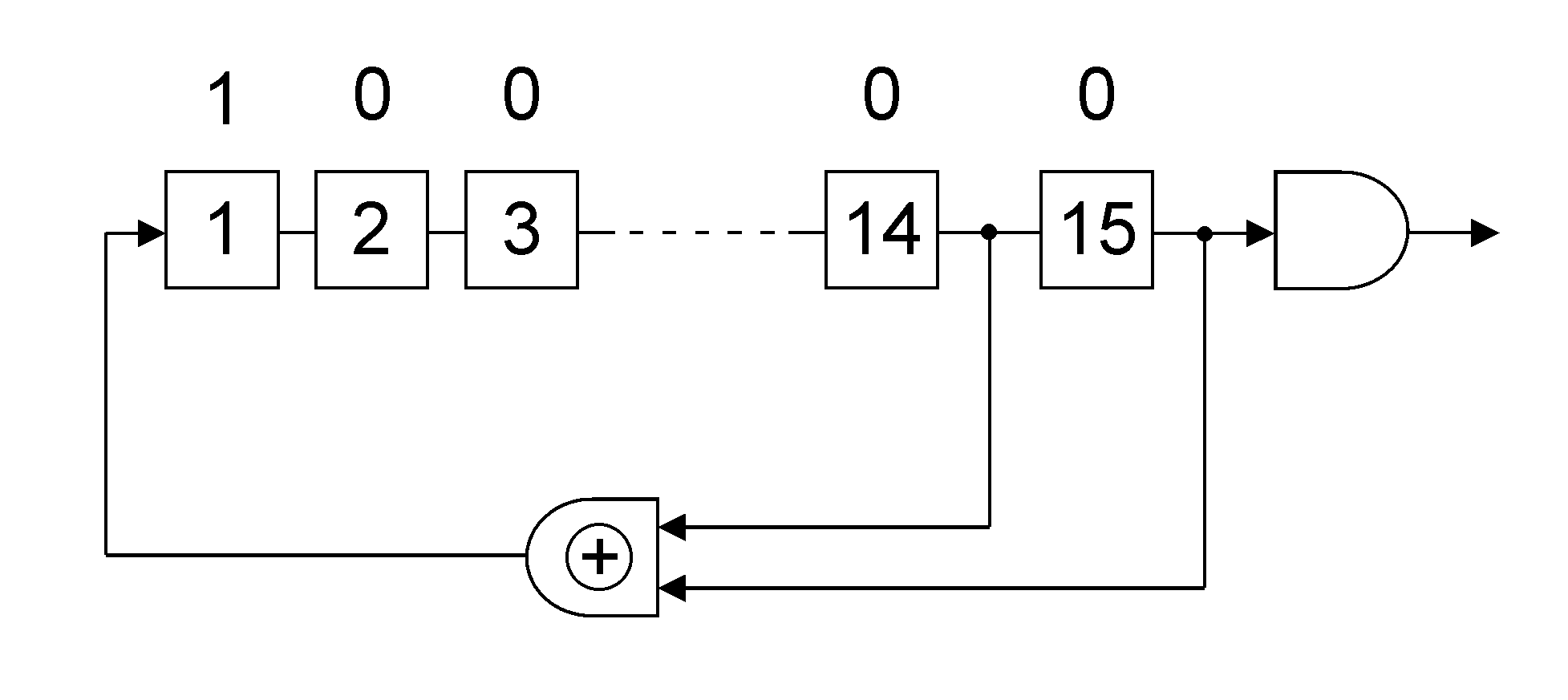 PRBS 15 generator